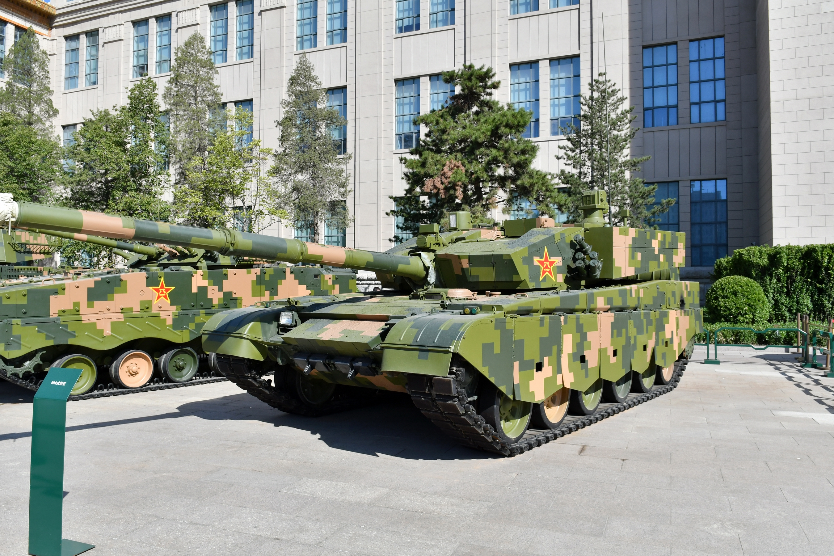 中国人民革命军事博物馆纪念中国人民解放军建军90周年主题展览展出的99A式坦克。